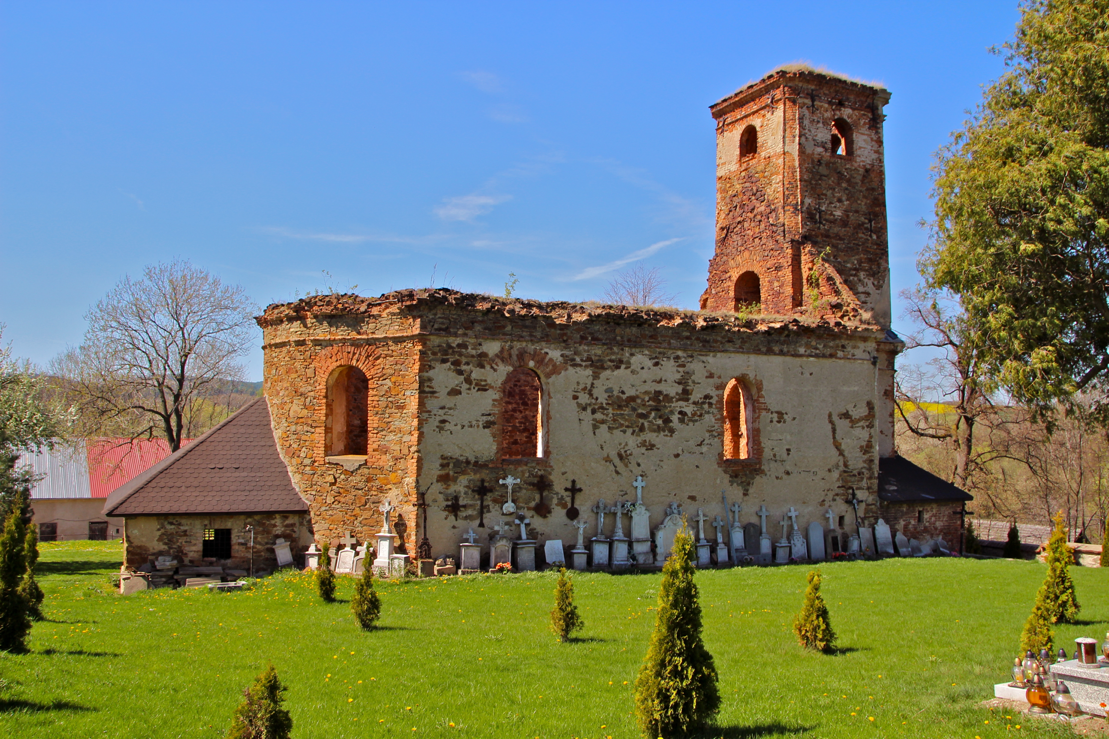 Pielgrzymów - kościół p.w. św. Józefa, ruina, 1805-10 (zabytek nr 954/65 z 26.01.1965)